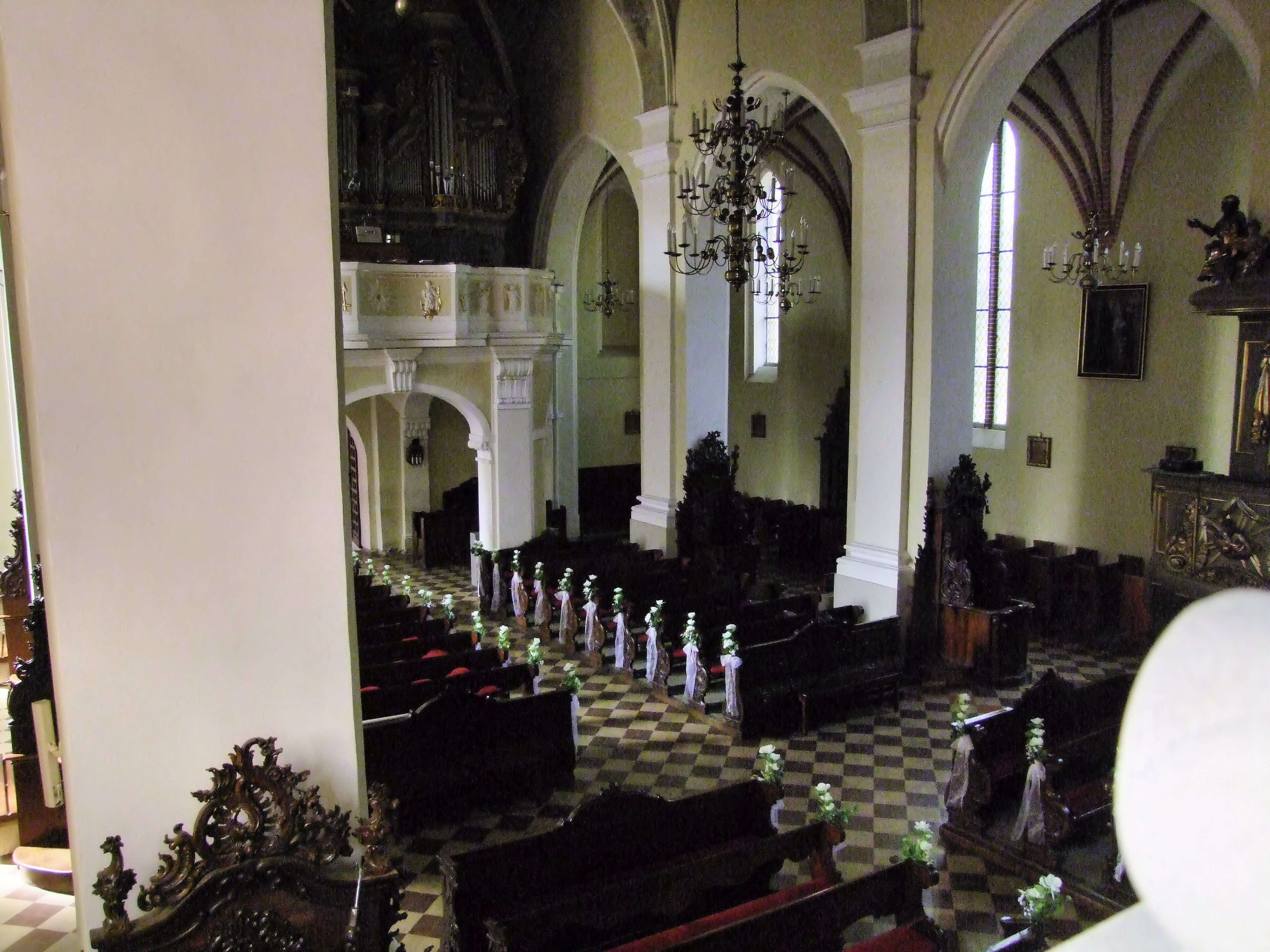 Gostyń, ul. Przy Farze 2 - kościół parafialny pw. św. Małgorzaty z 2. połowy XV, XVIII, XIX w. (zabytek nr AK-13)